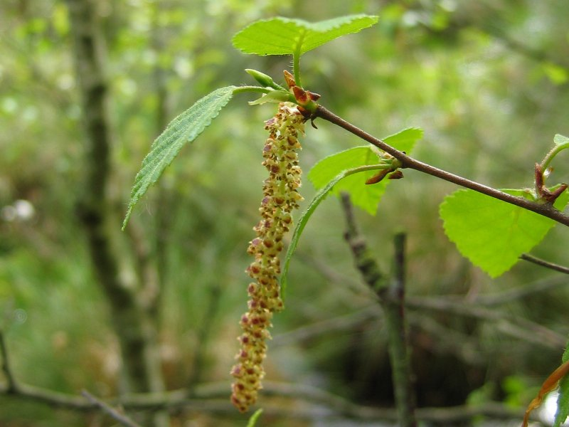 Blütenstand einer Karpaten-Birke Betula pubescens subsp. glutinosa, Rügen